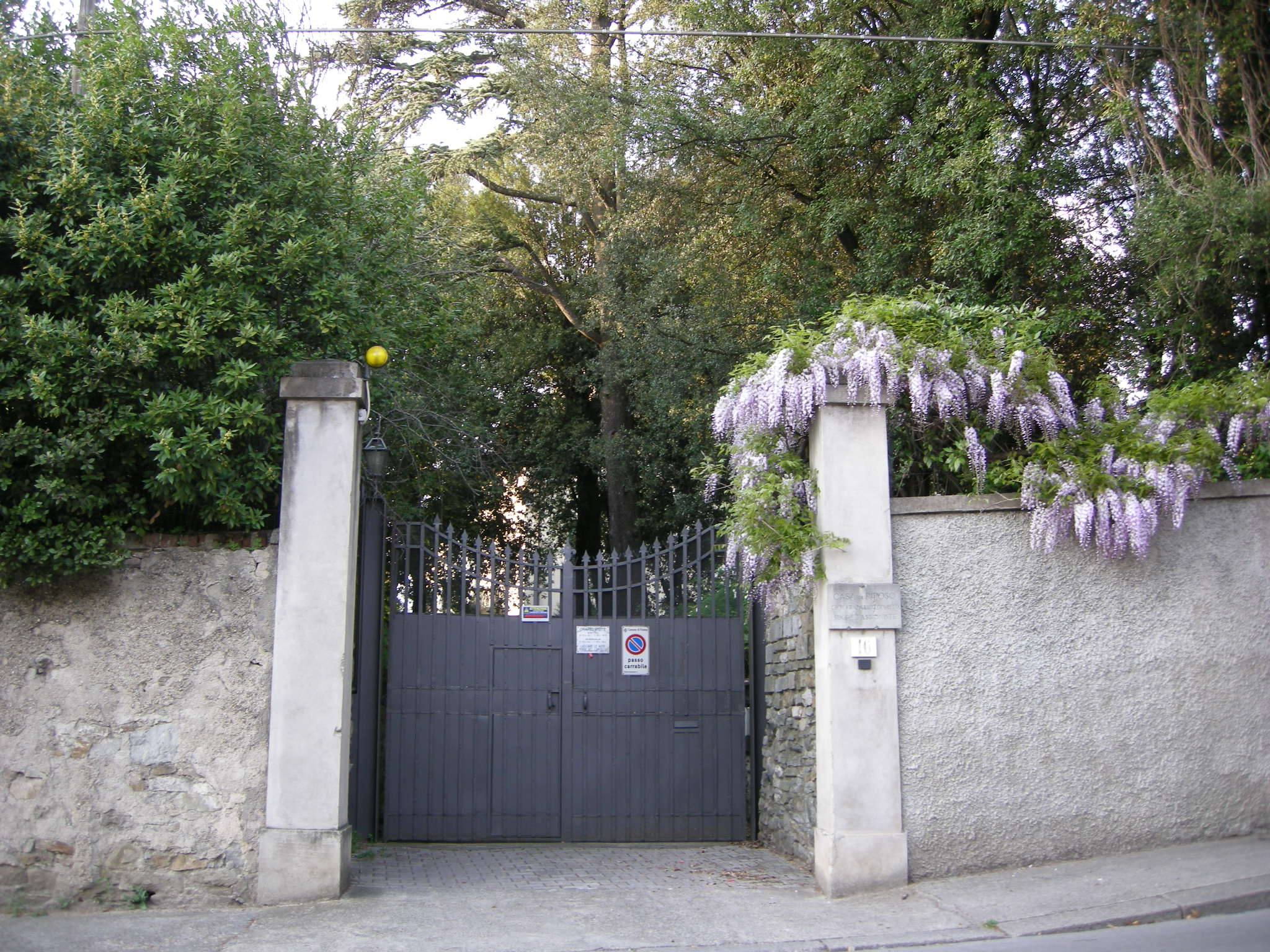 Ingresso villa orvieto